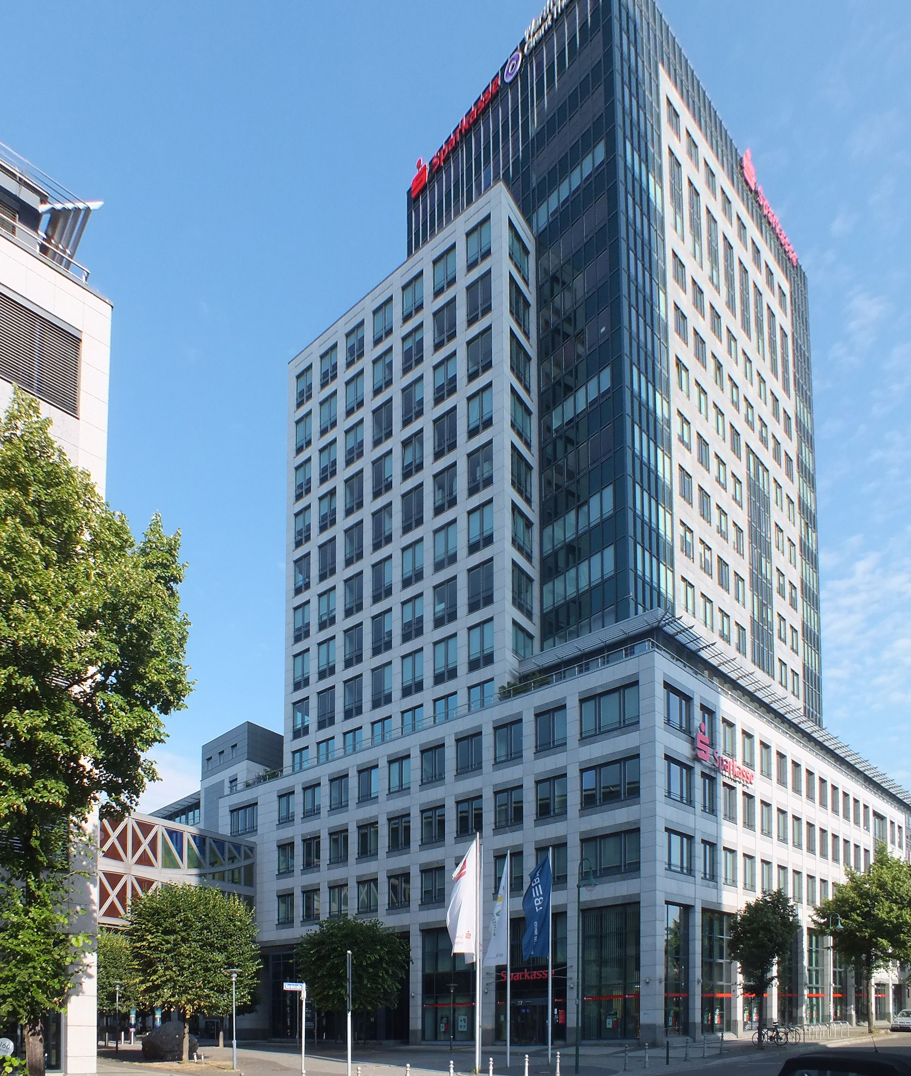 Löhrs Carré in Leipzig. Nordteil von Südosten